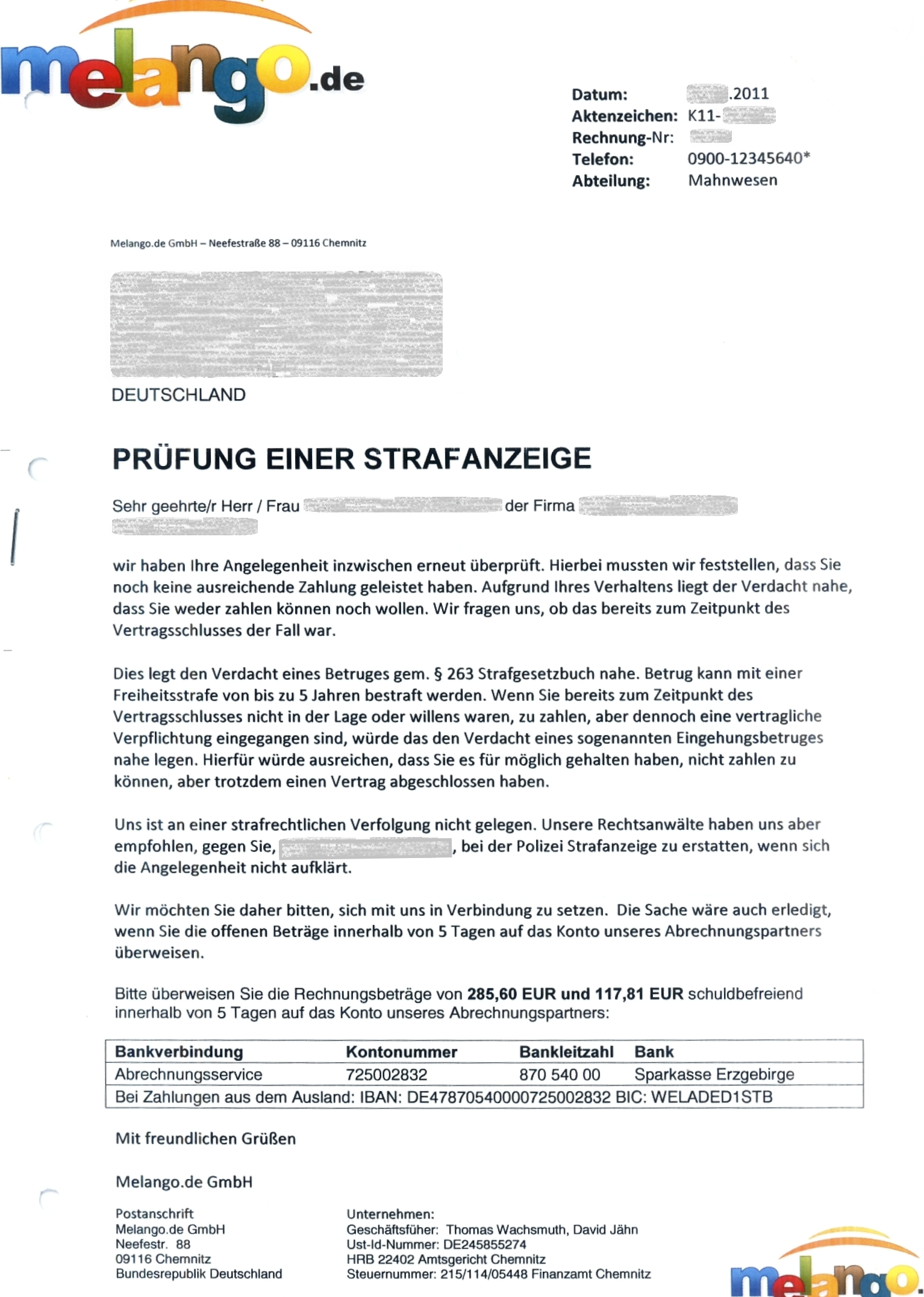 Androhung einer Strafanzeige aus der Drohkulisse eines B2B-Abzocker